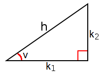 En rettvinklet trekant de trigonometriske variablene hosliggende katet (k1), motliggende katet (k2), hypotenus (h) og vinkel (v).